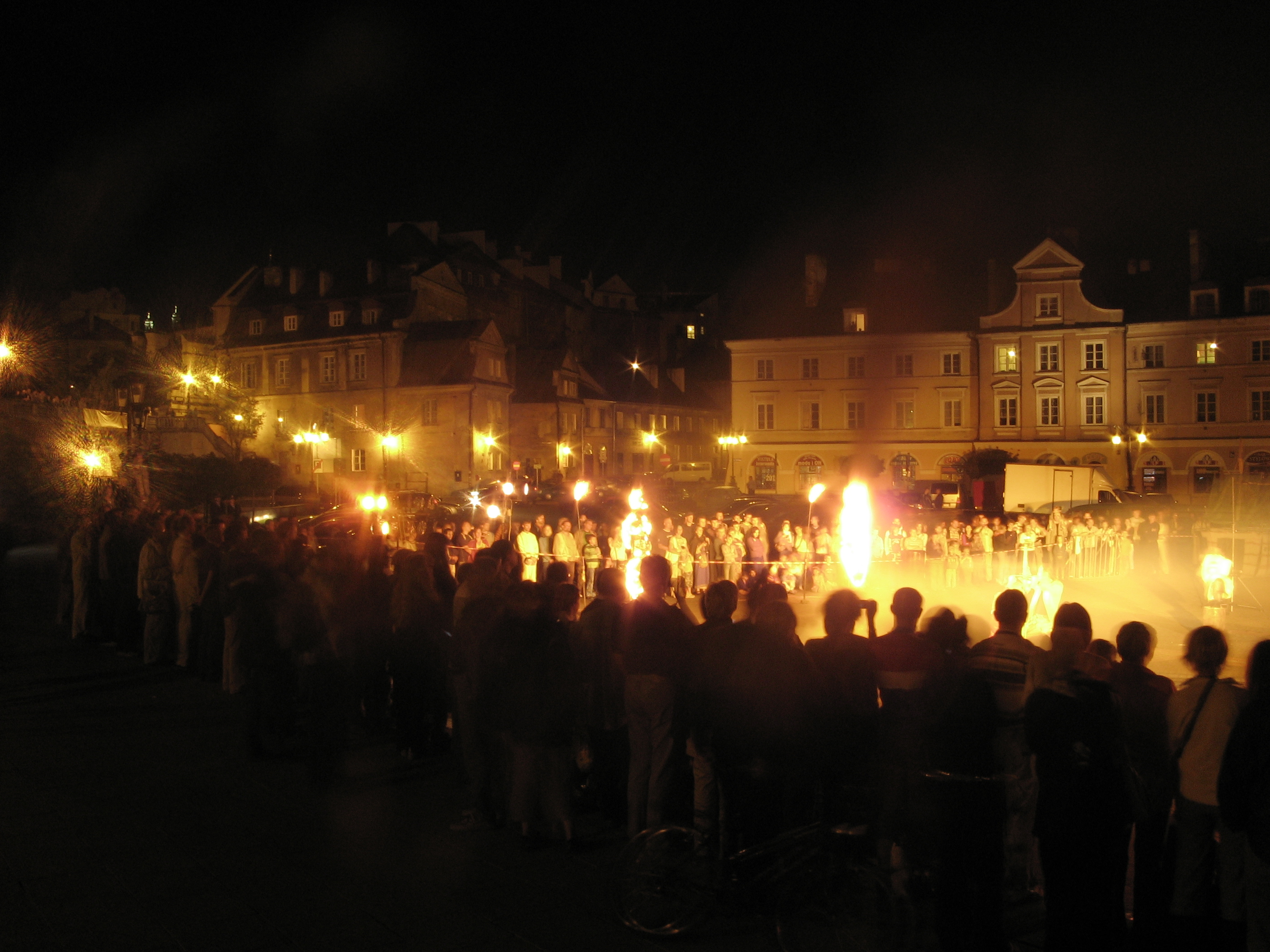 Lublin - Jarmark Jagielloński